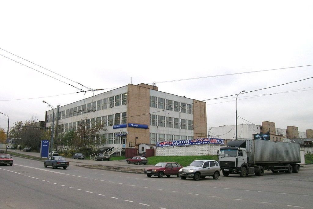 Коровинское шоссе в Москве.